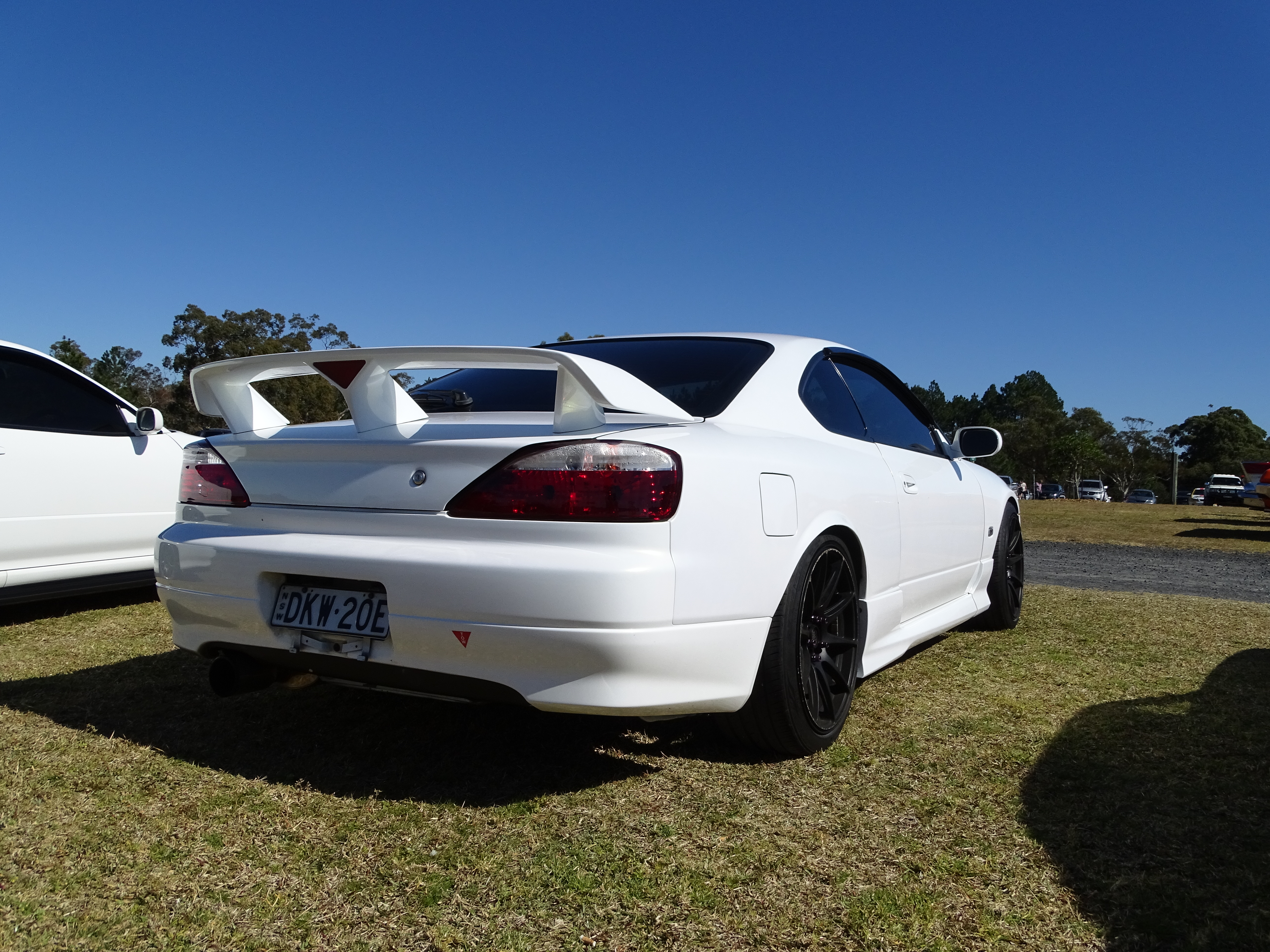 Nissan 200SX